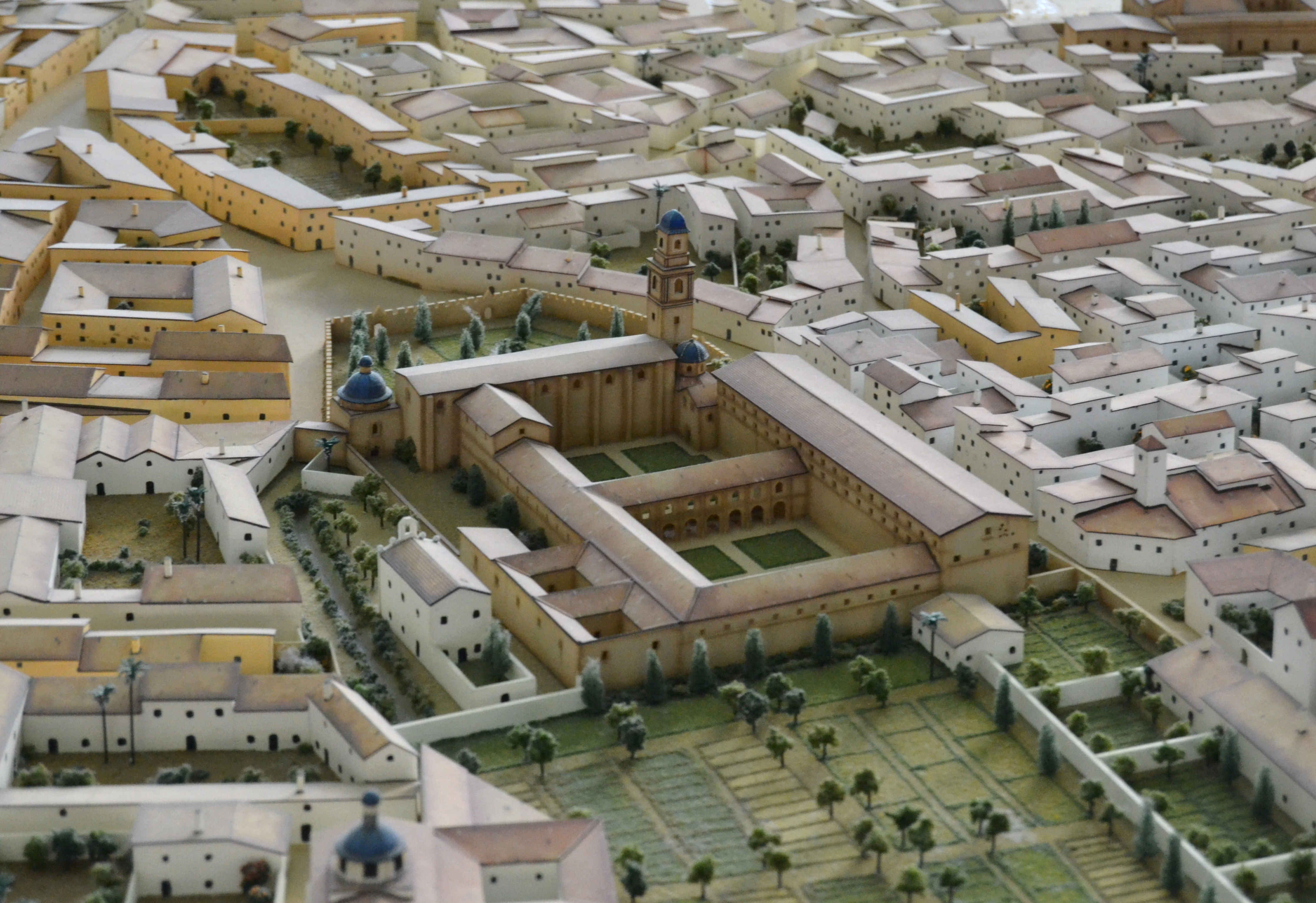 Convent de sant Francesc a la maqueta de València segons el plànol de Tosca, MuVIM.